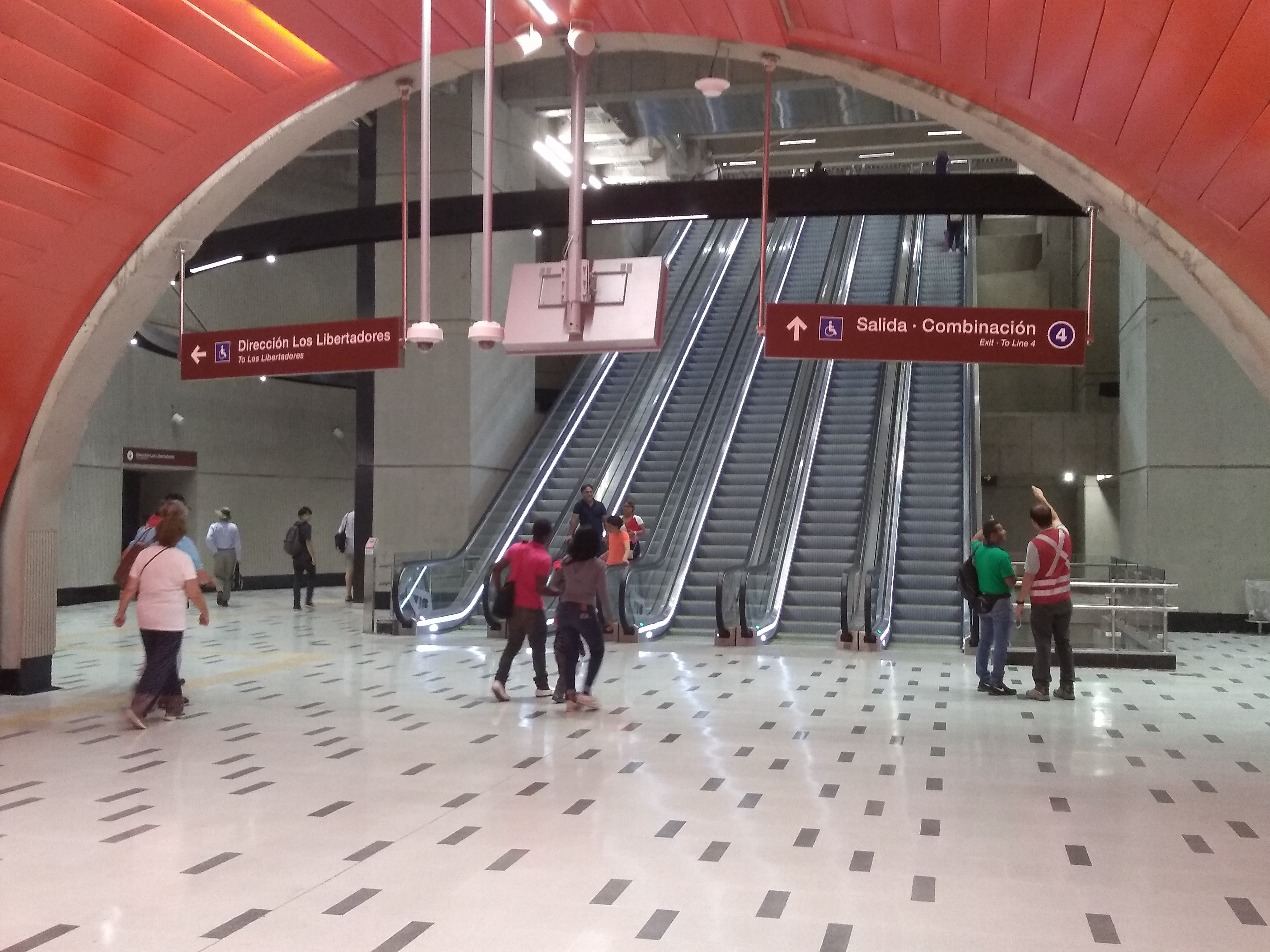 Nivel de combinación entre Lineas 3 y 4